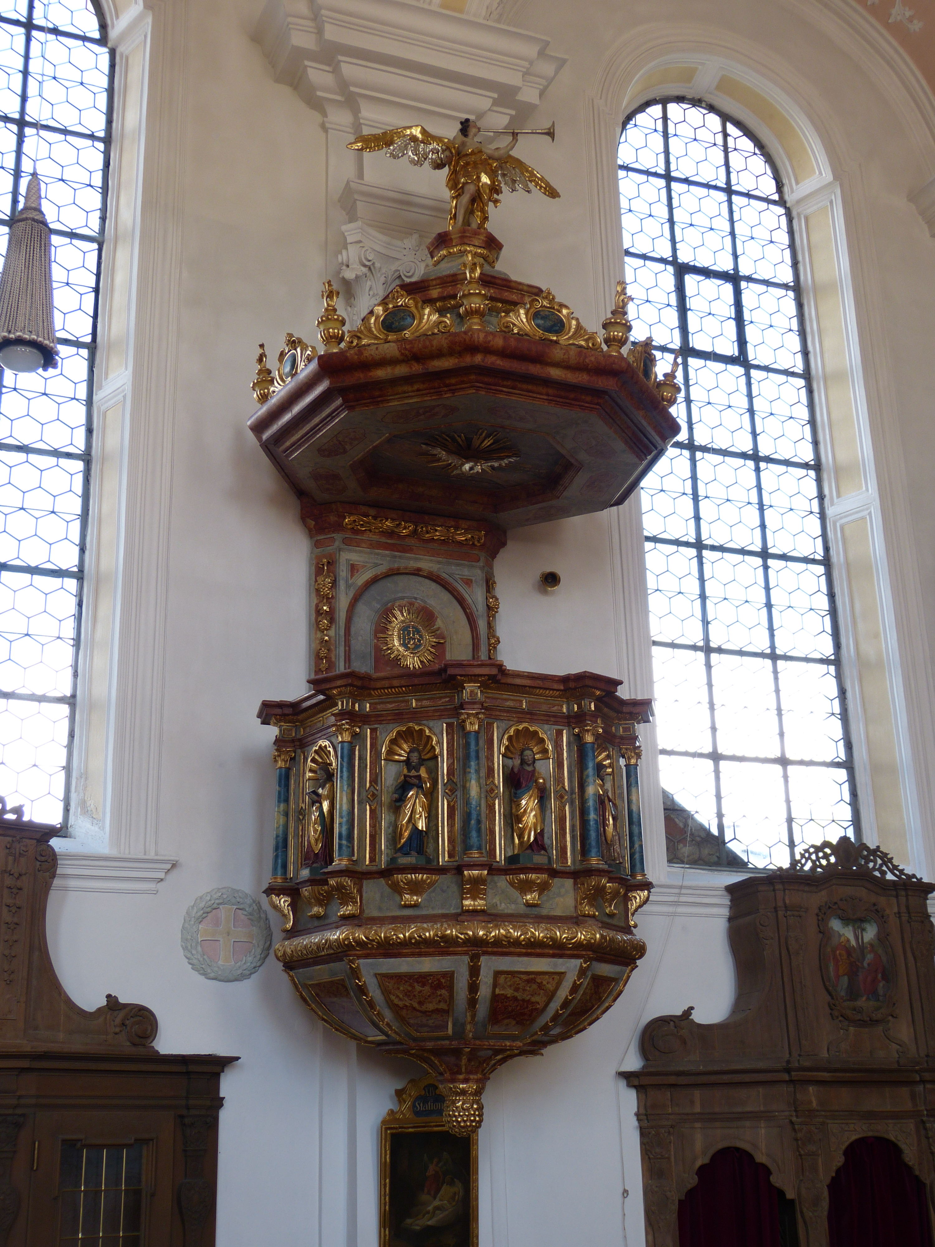 St. Martin in Boos, Landkreis Unterallgäu, Bayern